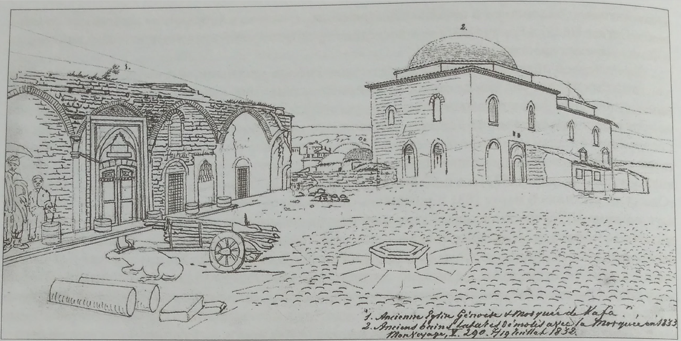 Старая генеэзская церковь и мечеть в Кафе. Старые татарские бани, разрушенные вместе с мечетью в 1833 году. Зарисовка в путевом альбоме Дюбуа де Монпере